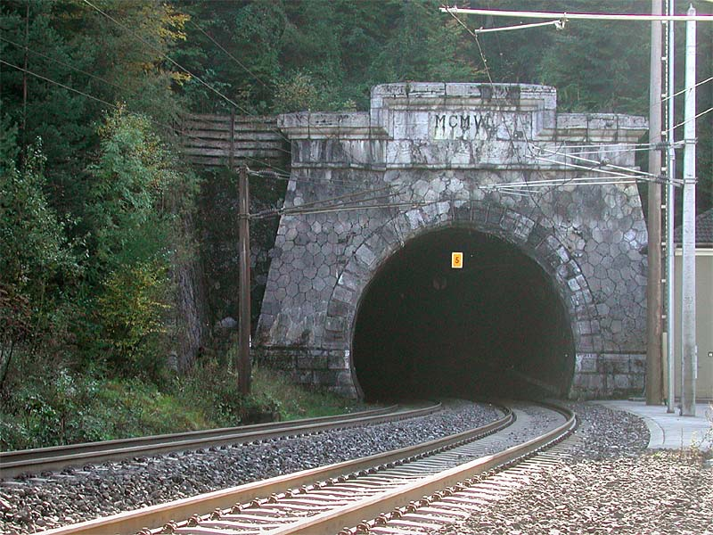 Nordportal des Karawanken-Eisenbahn-Tunnel